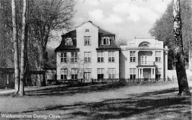 Dwór V, Gdańsk-Oliwa (obecnie dzielnica VII Dwór).